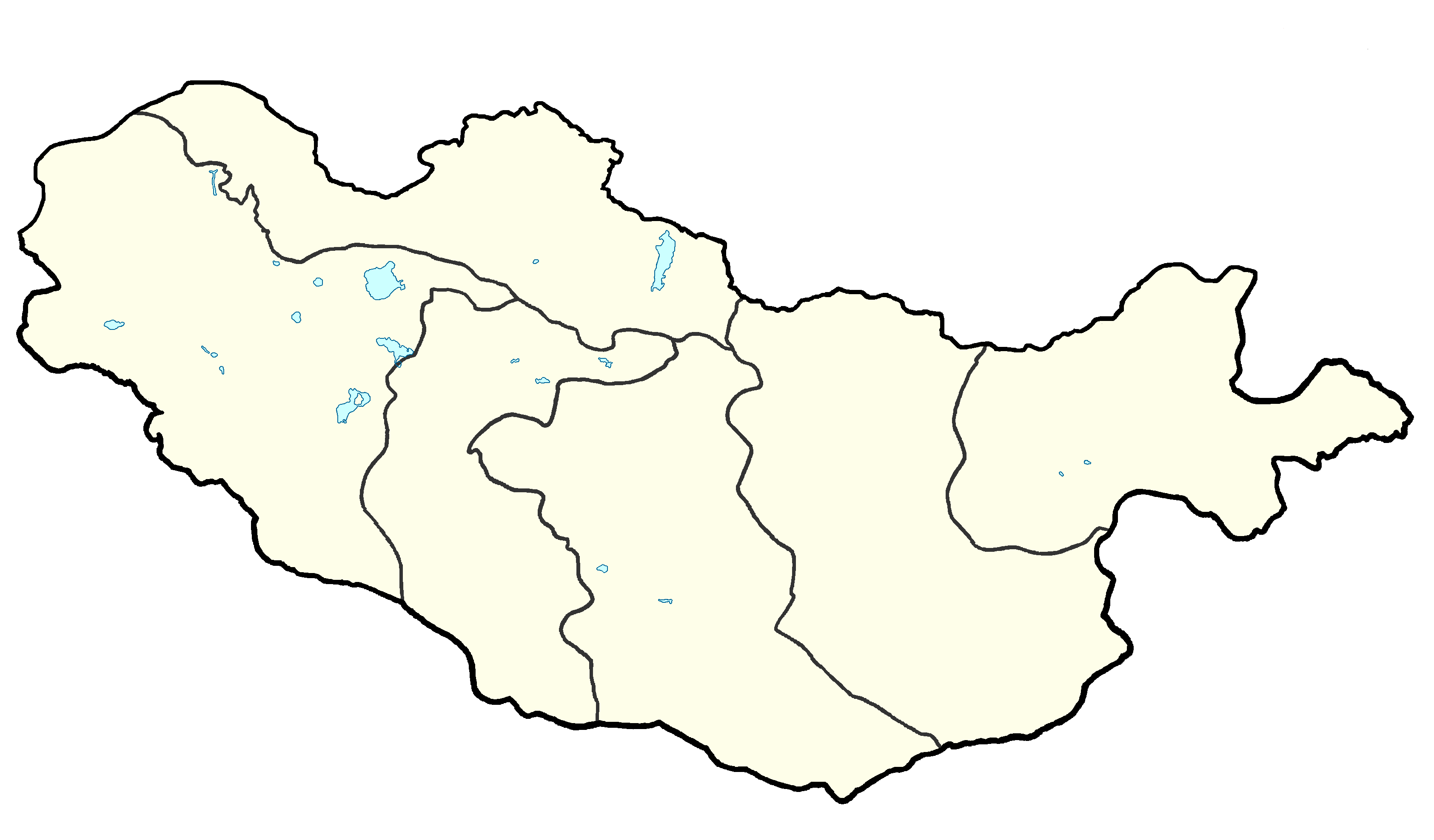 청나라 치하 외몽골